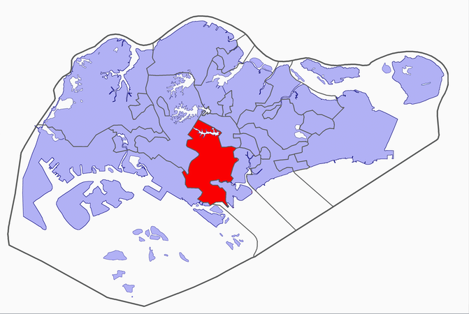 Singapore electoral map, 2006